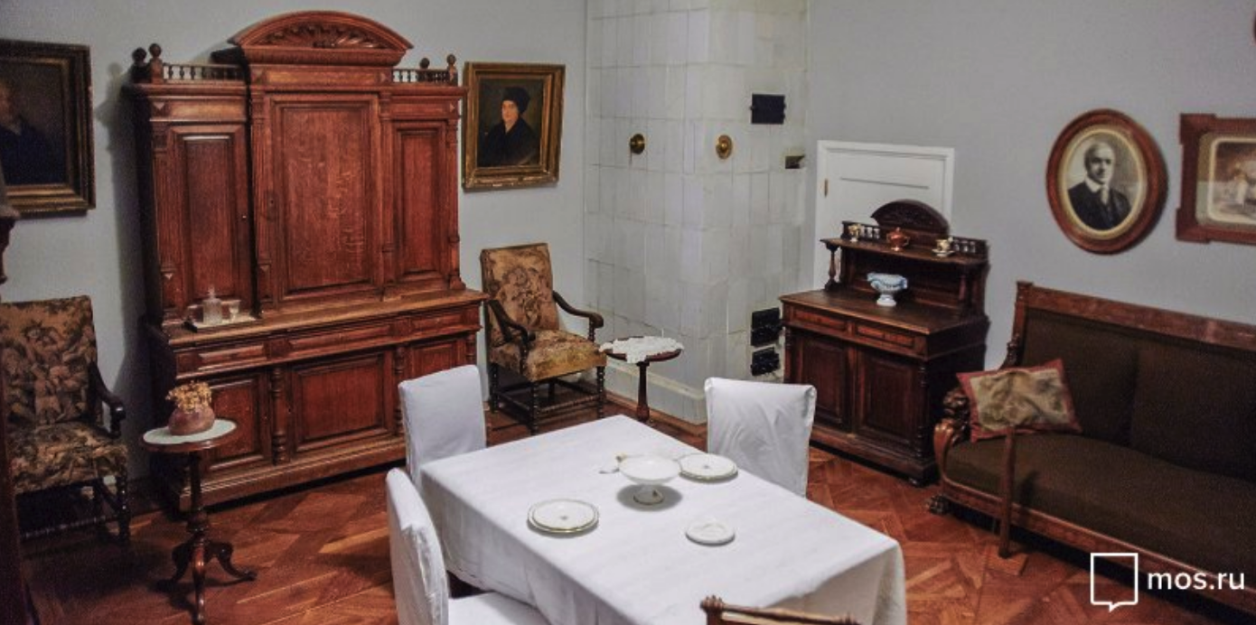 Интерьеры музея Станиславского в Леонтьевском переулке, 2016 год